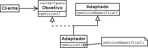 Opción un de deseño do patrón adaptador.